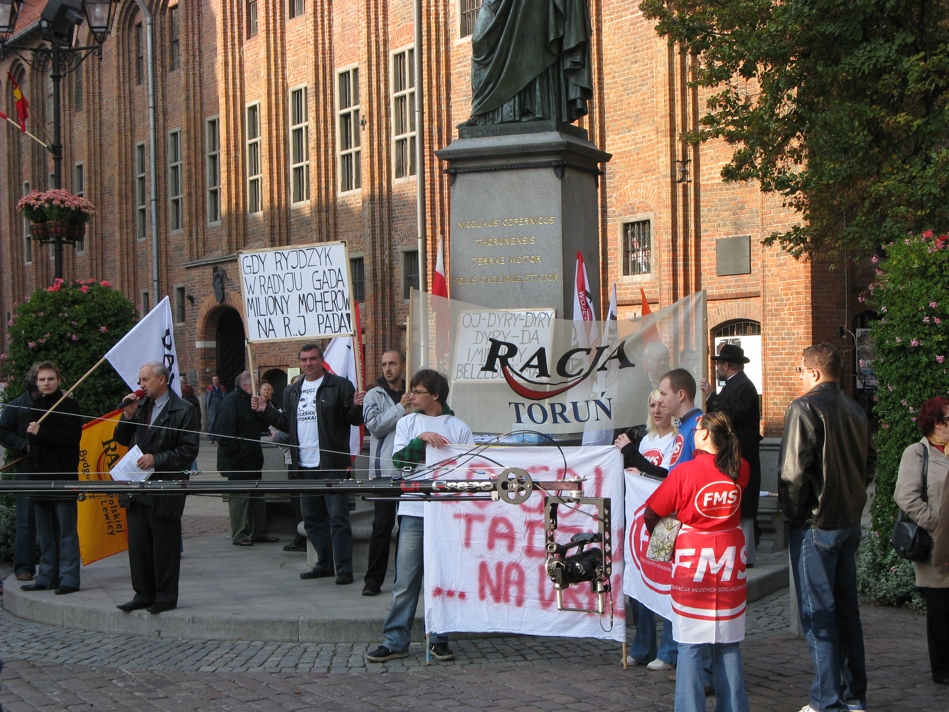 Manifestacja antyklerykalna partii RACJA Polskiej Lewicy pod pomnikiem Mikołaja Kopernika w Toruniu